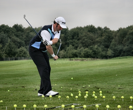 Joost HAge, golfpro, doet Trickshots